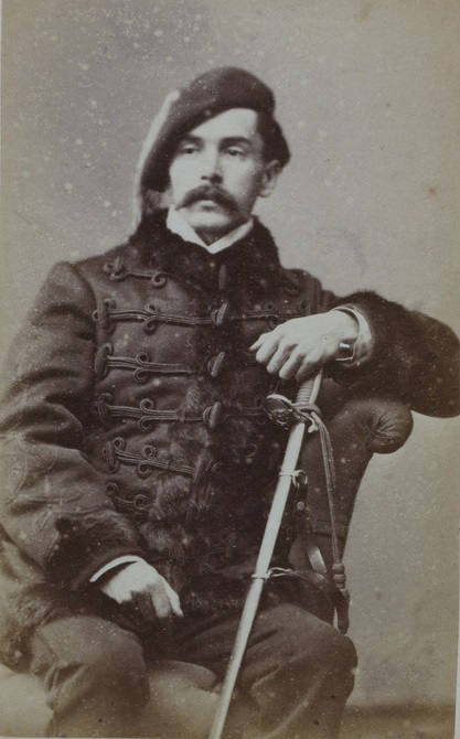 Retrat de militar carlista